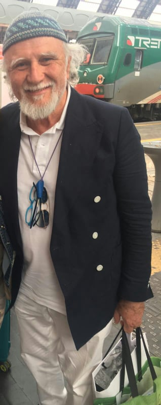 Moni Ovadia in stazione dei treni